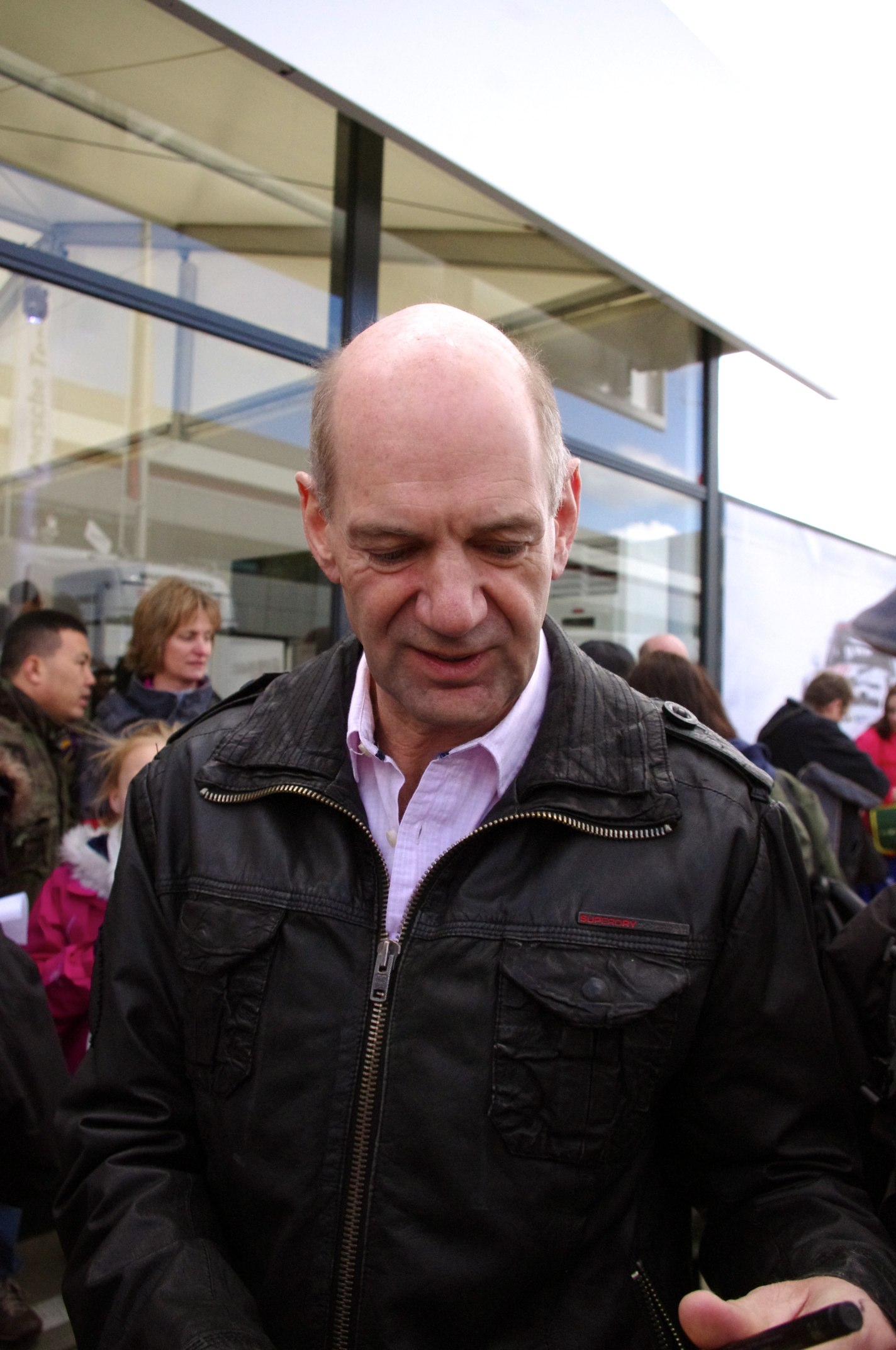 Adrian Newey